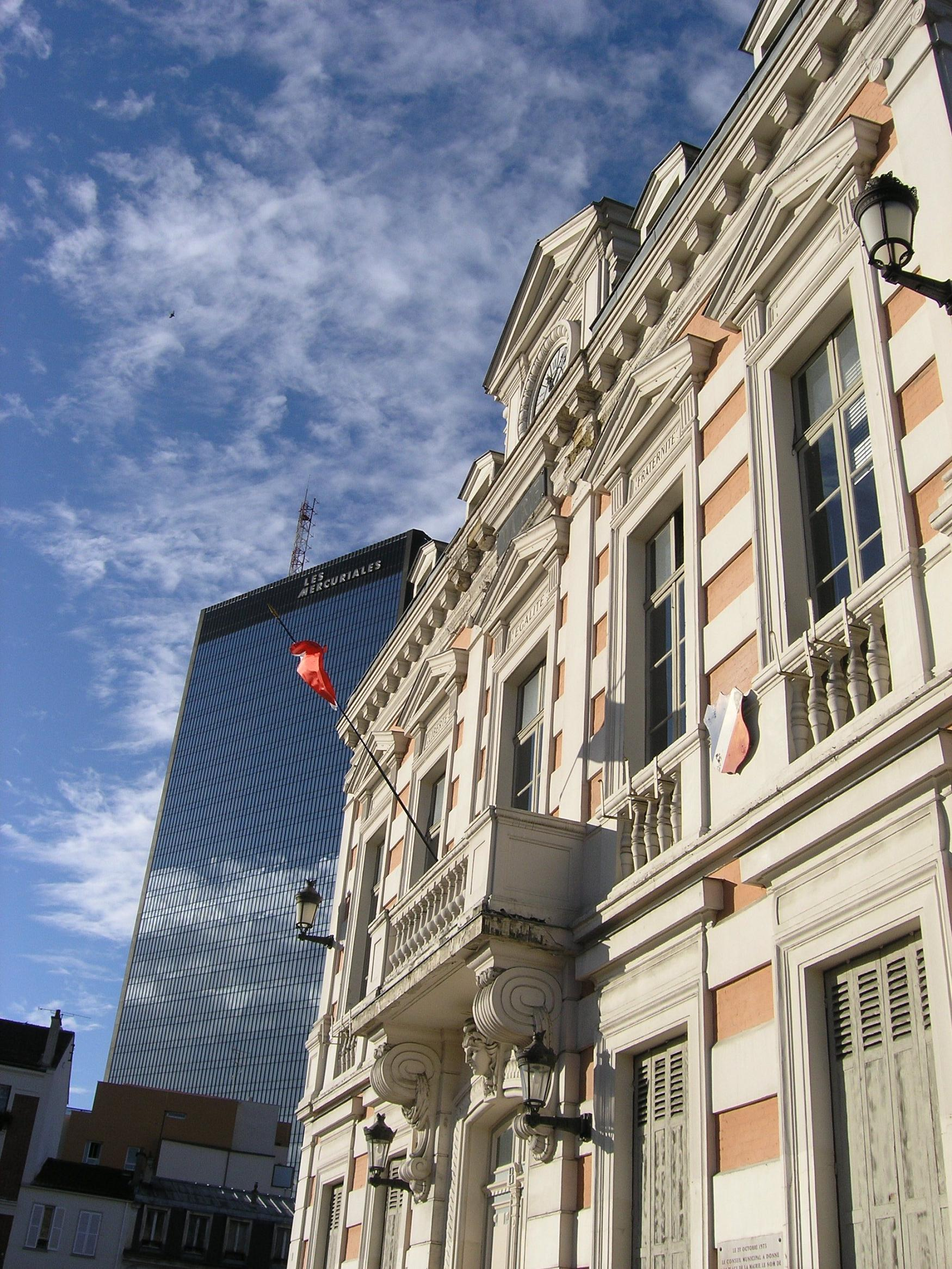 Bagnolet, facade mairie et mercuriales